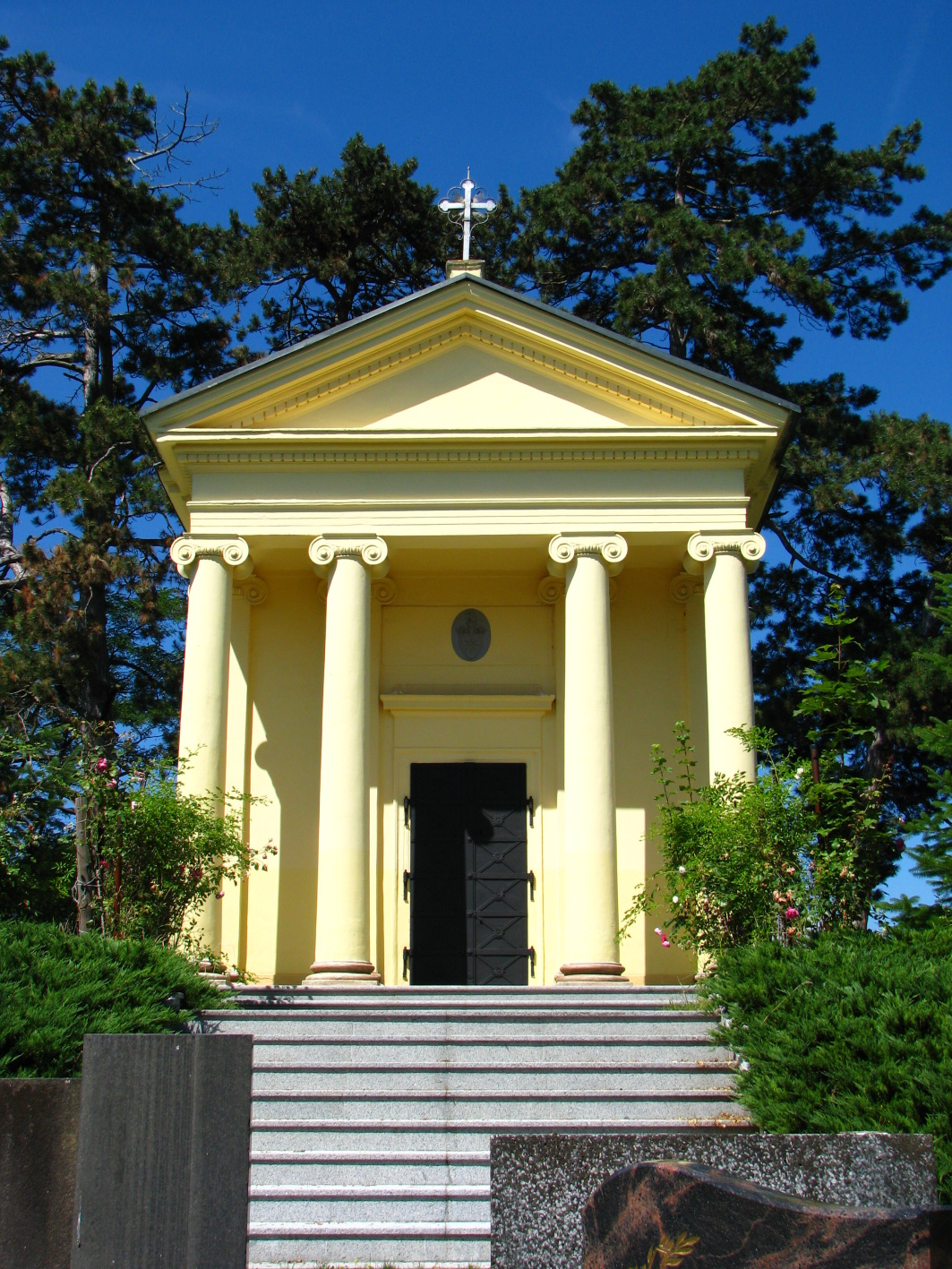 Pohřební kaple (Stupno), hájek za hřbitovem, Stupno